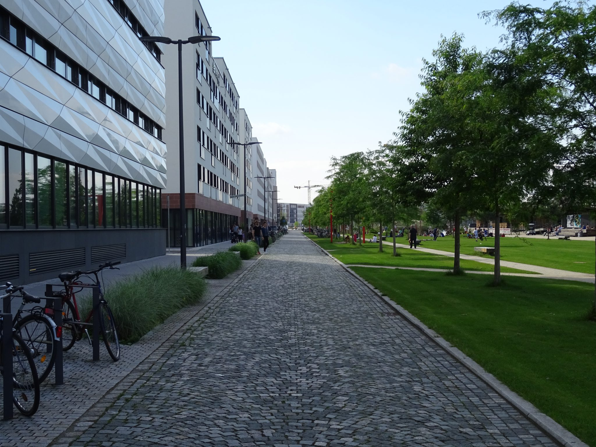 Der Eingang zur Bahnstadt, der Zollhofgarten